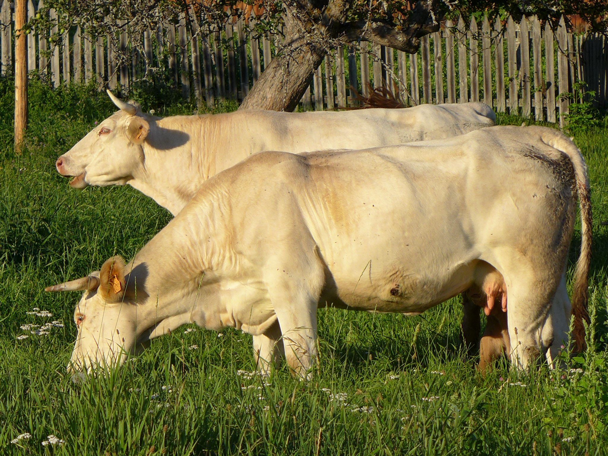 Vaches dans l'herbe